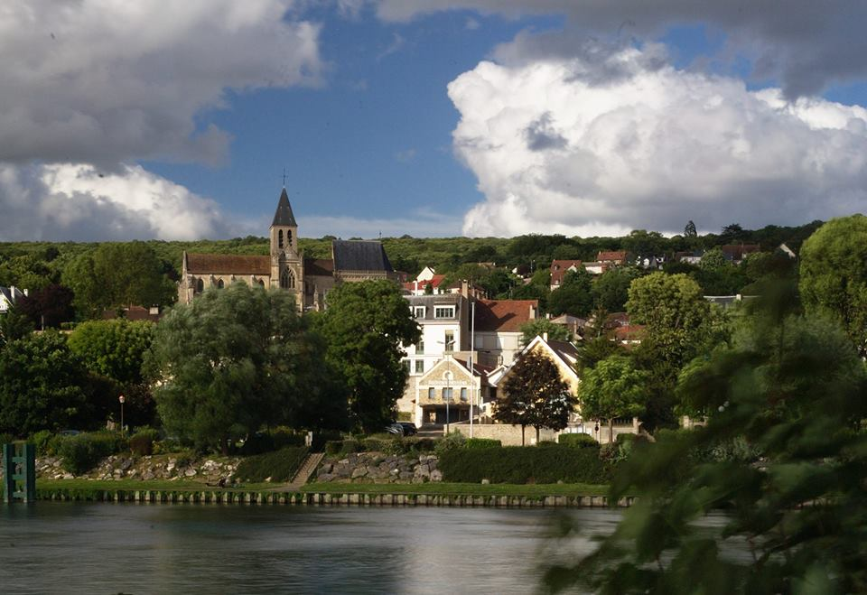 L'église de Triel sur Seine et l'ancien centre.